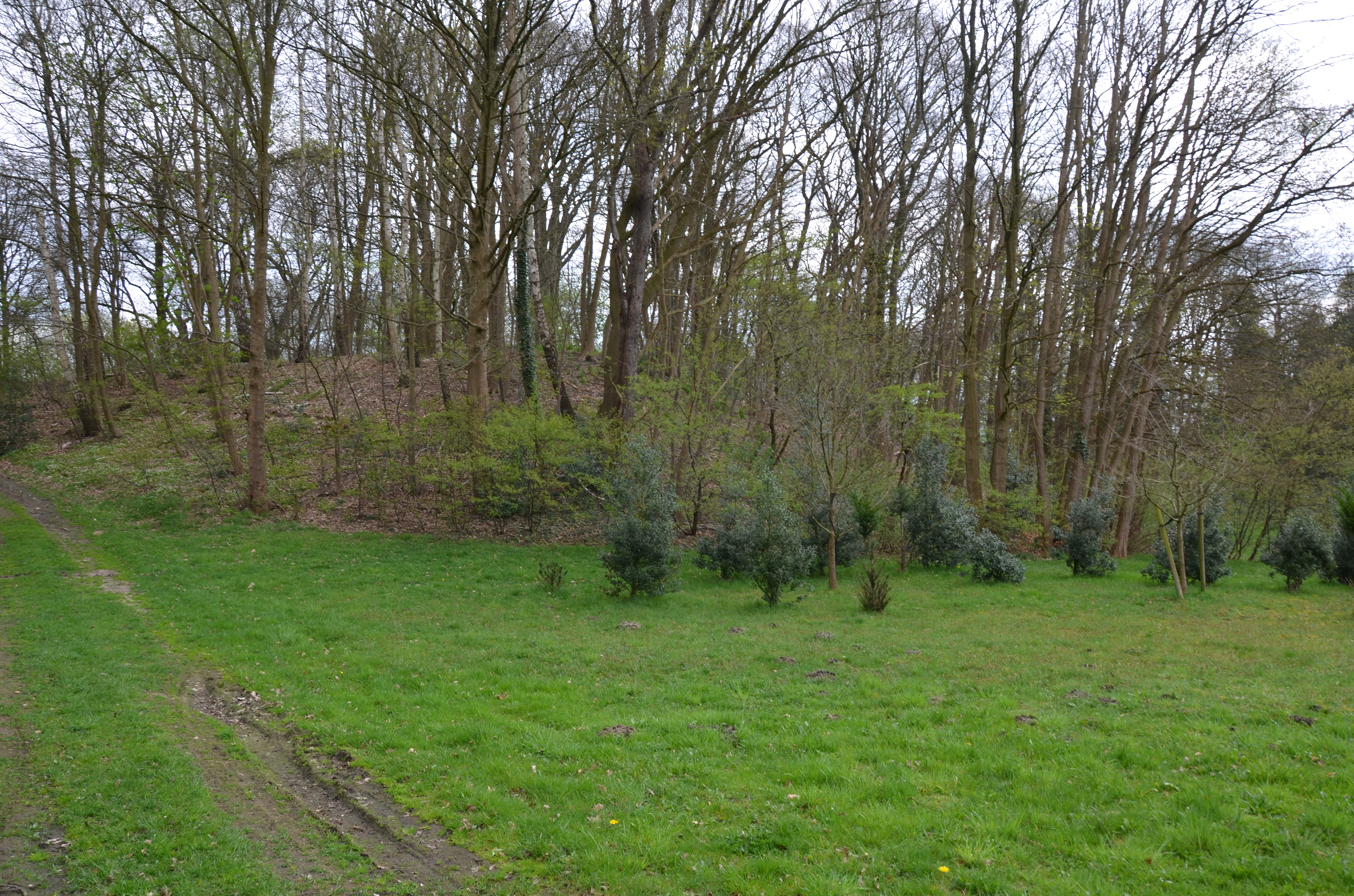 Blumenthaler Burgberg (etwas südlich des Wasserwerks Blumenthal, nordöstlich der A 270), Bereich im Landschaftsschutzgebiet „Bremen 1968 3. Änderung“, Wasserschutzgebiet Blumenthal